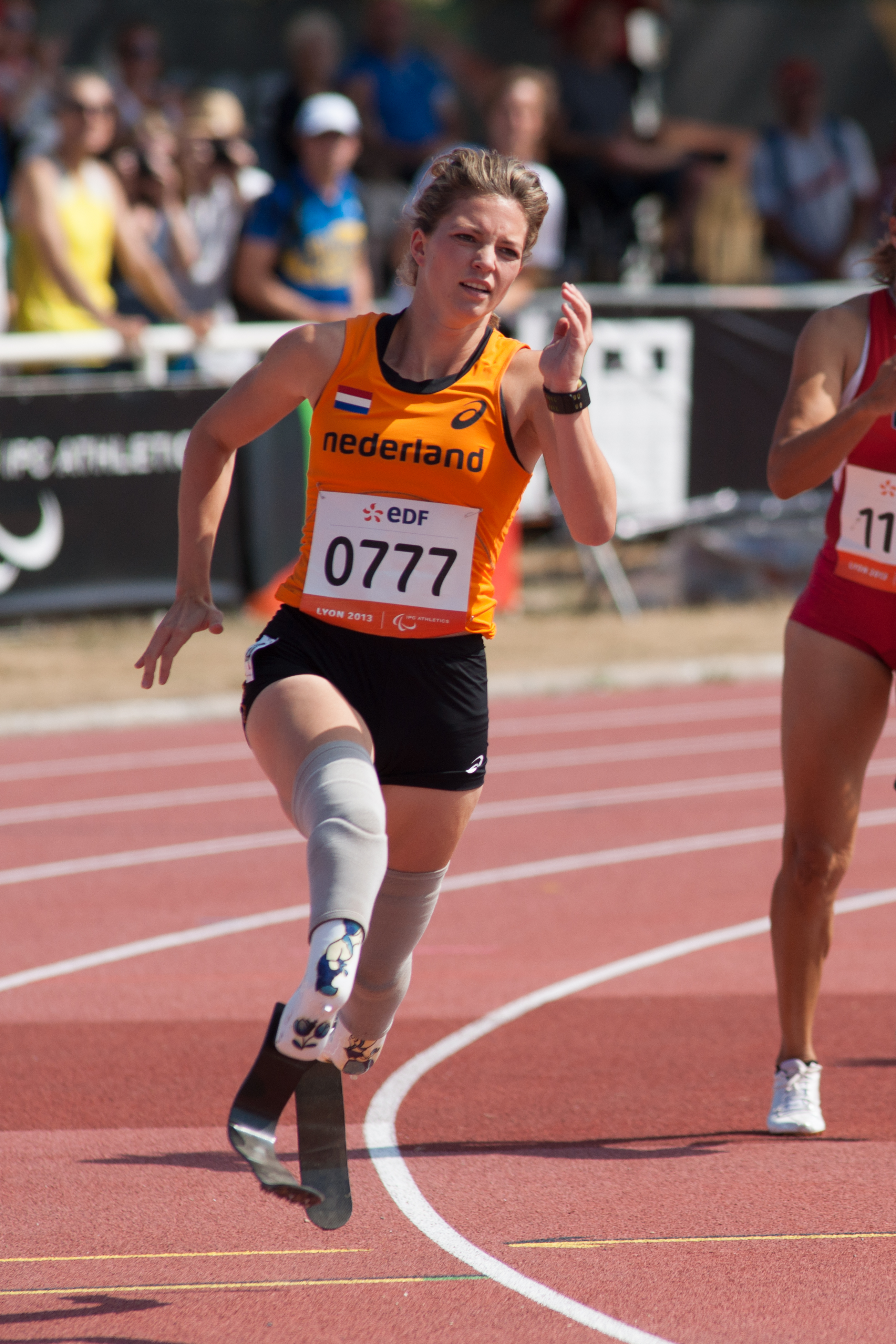 200 mètres féminin T44.